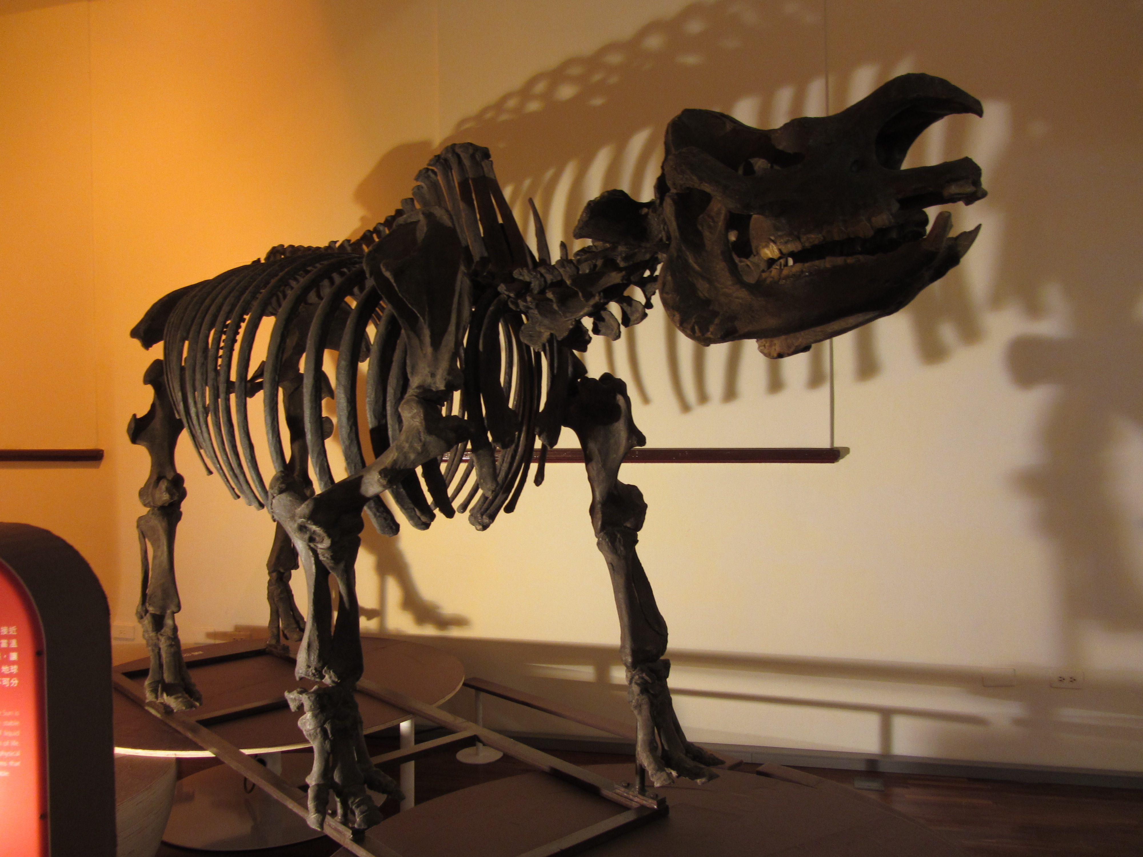 早坂犀牛（Rhinoceros sinensis hayasakai）